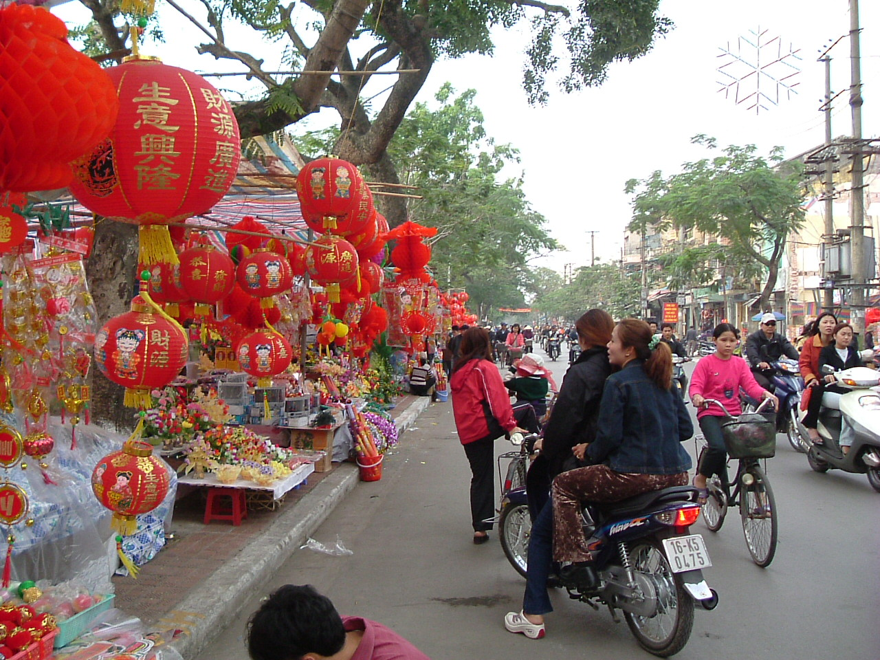 Blumenmarkt in Haiphong zu Tet 2004